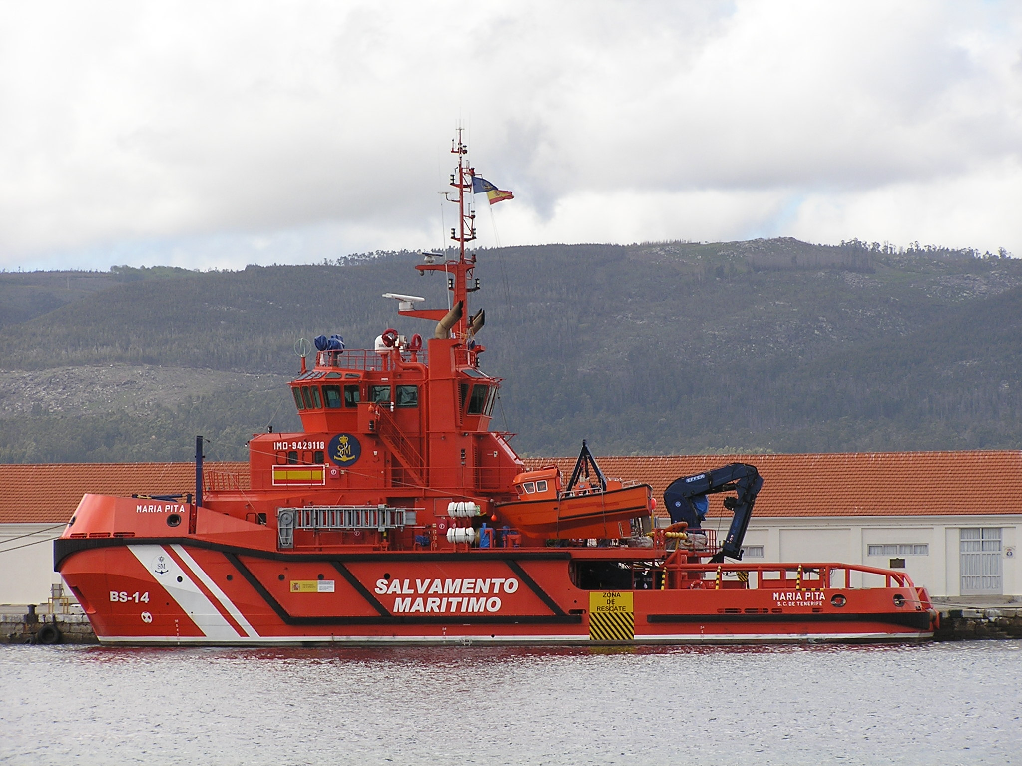 País: España - Salvamento Marítimo Clase, [Tipo]: María de Maeztu. Constructor: Boluda Shipyards, Valencia, España. Fecha botadura: 19 de enero de 2008. Dimensiones ( metros ): 39,7 x 12,5 x 4,2 Propulsión: 2 x diesels ABC 8DZC-1000-175 ( 5.500 cv ). Velocidad ( nudos ): 13. Autonomía ( millas ): 6.000. Dotación: 10 + 2. Capacidad de transporte: 359 m3 gasoil, 115m3 agua 21m3 aceite, espuma 13m3, detergente 12m3. Indicativo: ECMF